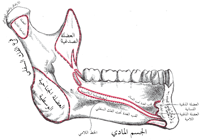 الفك السفلي عندالإنسان. السطح الداخلي. منظر جانبي.